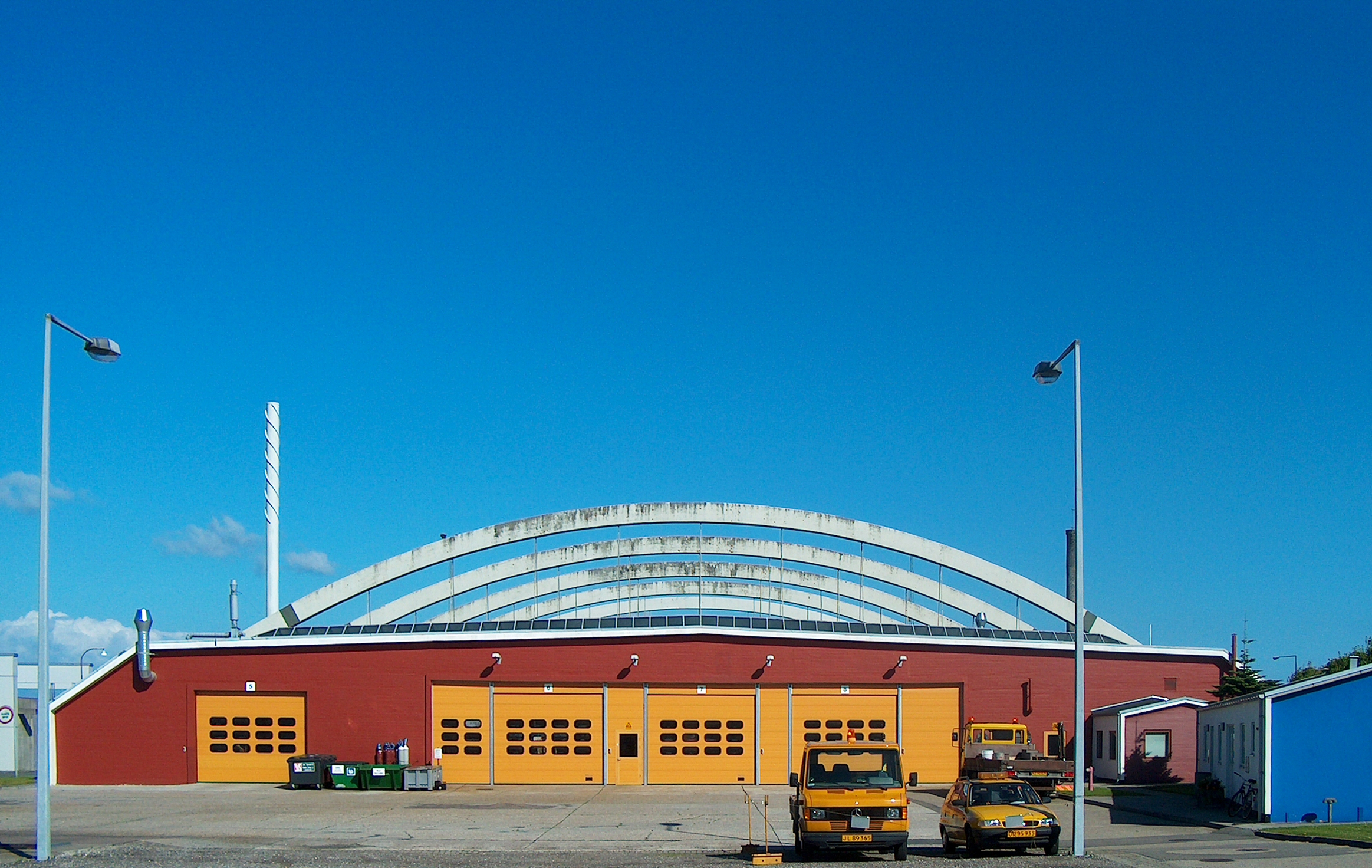 Værksted og garageanlæg for Århus sporveje, Gustav Holms Vej 30, DK-8200, Århus N udført af C.F. Møllers tegnestue